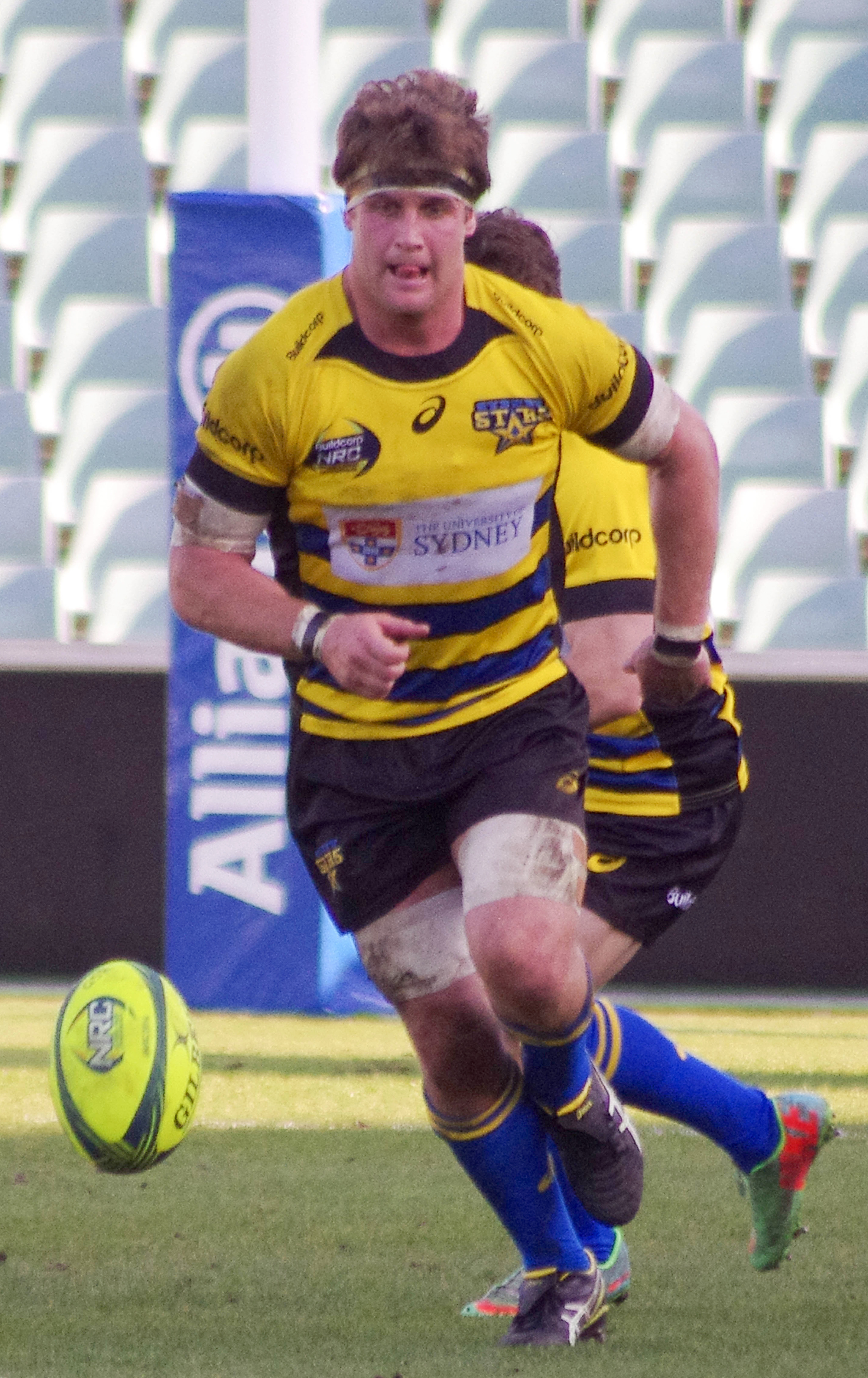 PAT MCCUTCHEON